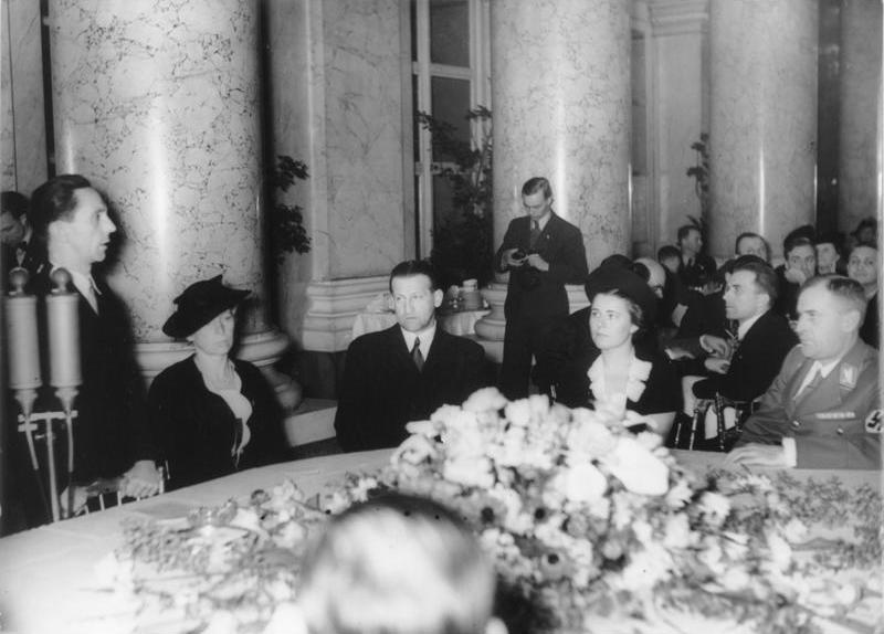 Reichsminister Dr. Goebbels empfing heute in der Wiener Hofburg die Wiener Schauspieler. Reichsminister Dr. Goebbels während seiner Rede. V.l.n.r. Dr. Goebbels, Frau Reichsstatthalter Seyss-Inquart, Staatssekretär Dr. Mühlmann und Paula Wessely. 30.3.38.